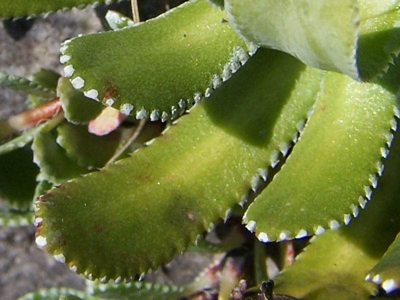 Saxifraga paniculata - folium (pl. skalnica gronkowa)